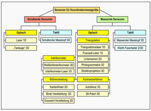 Gliederung der Sensoren nach dem physikalischen Prinzip